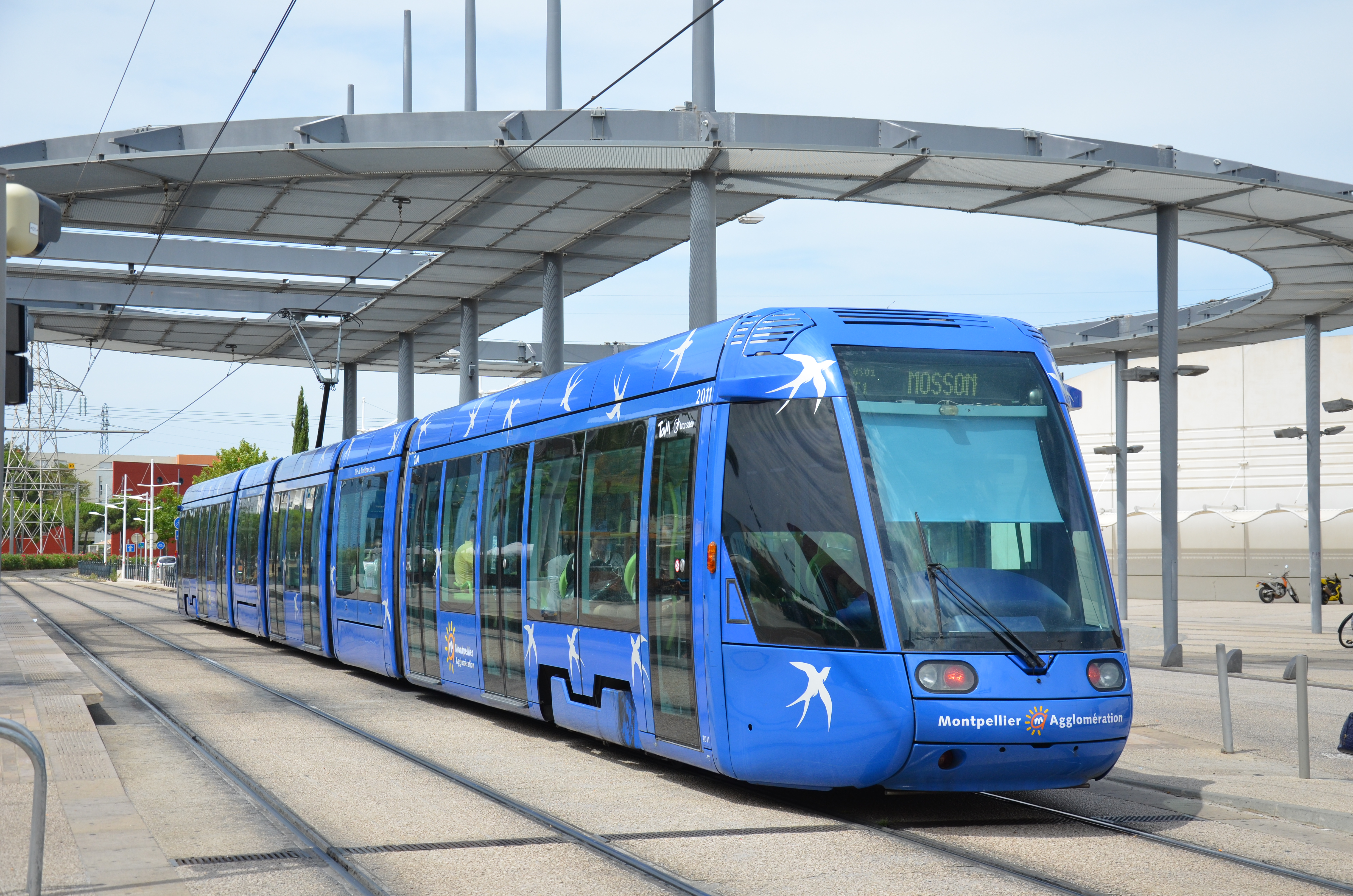 Alstom Citadis 401 n°2011 sur la ligne T1 du réseau TAM de Montpellier, à la station Place de France.